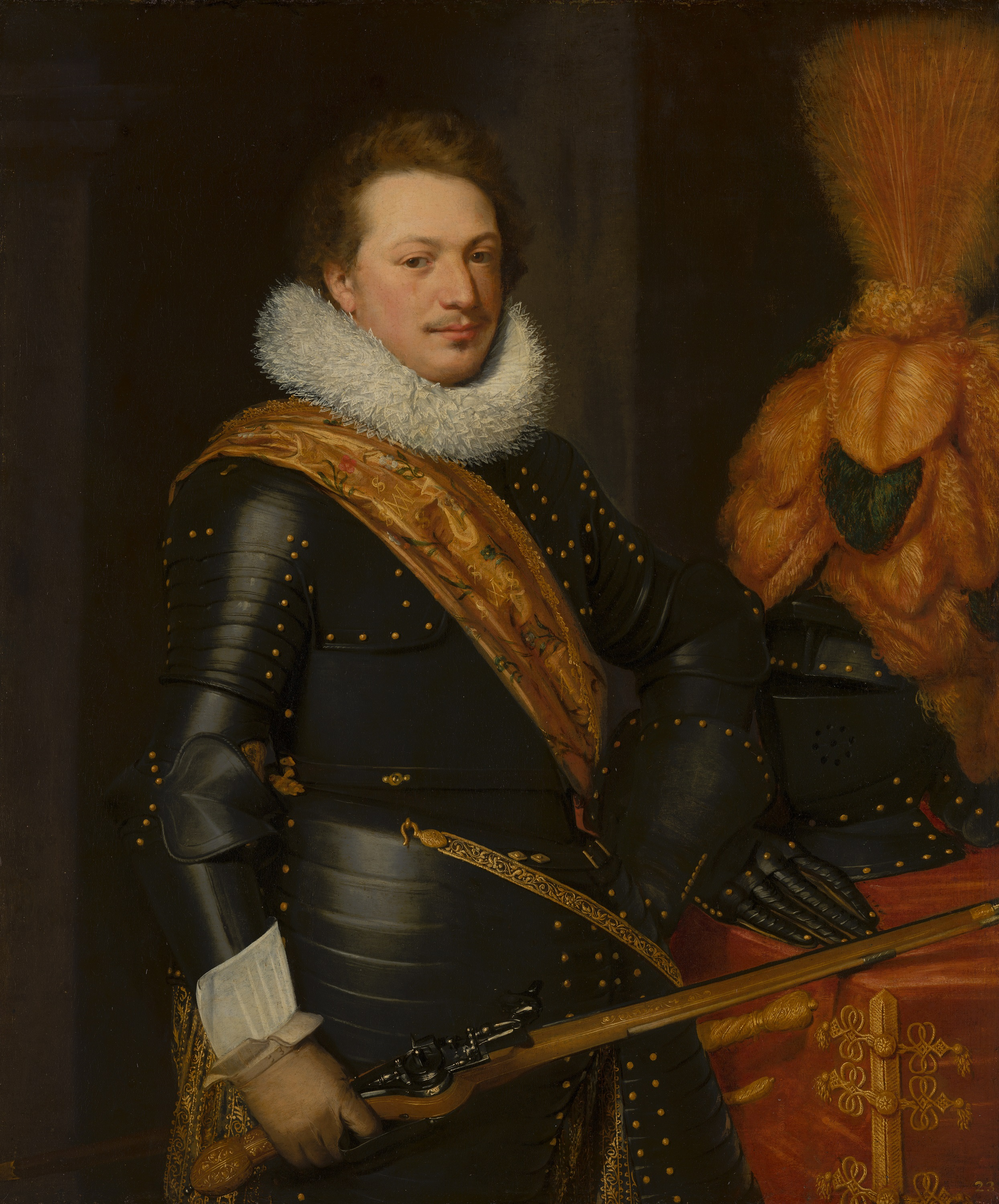 Portret van een officier, mogelijk Johan Wolfert van Brederode (1599-1655) of Walraven IV van Brederode (?-1620).